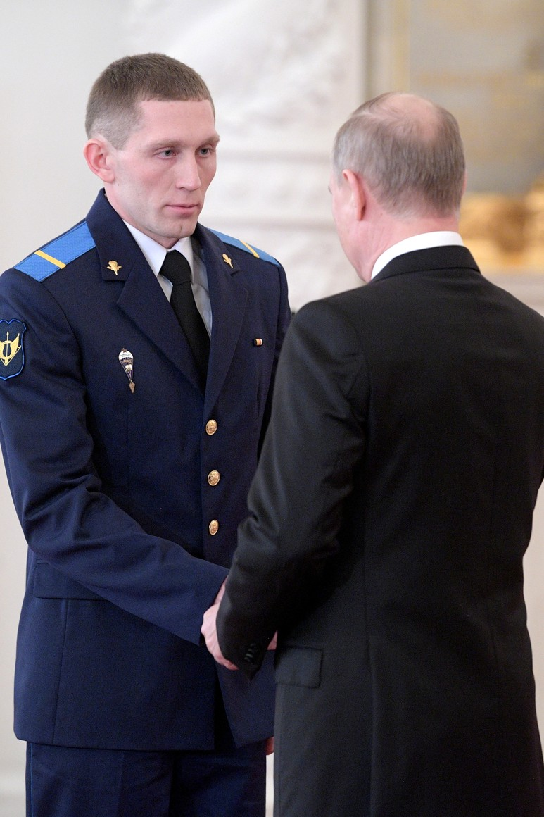 Встреча Президента России Владимира Путина с военнослужащими, участвовавшими в антитеррористической операции в Сирии. Ефрейтору Денису Портнягину присвоено звание Героя Российской Федерации.